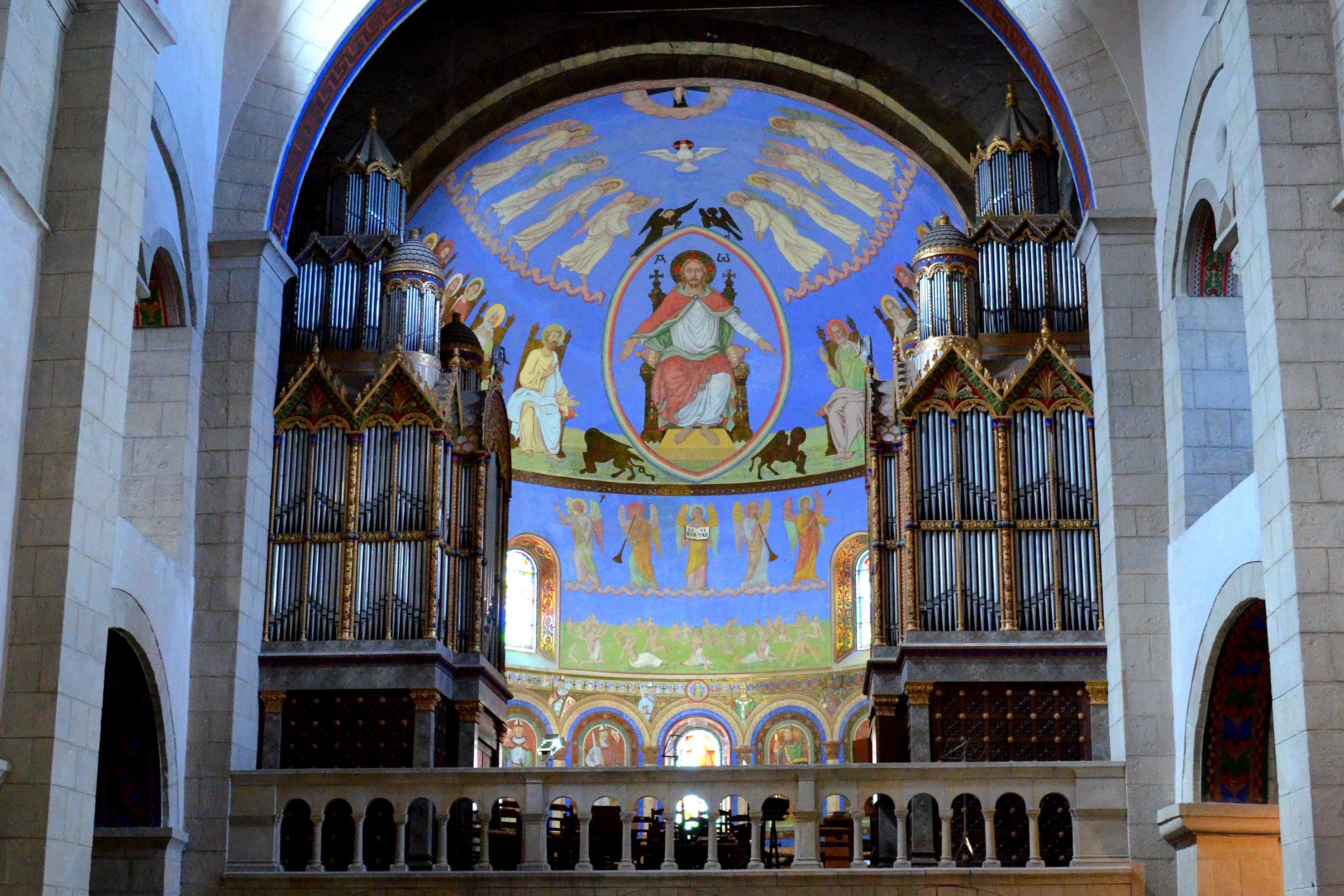 Stiftskerk Sint-Cyriacus